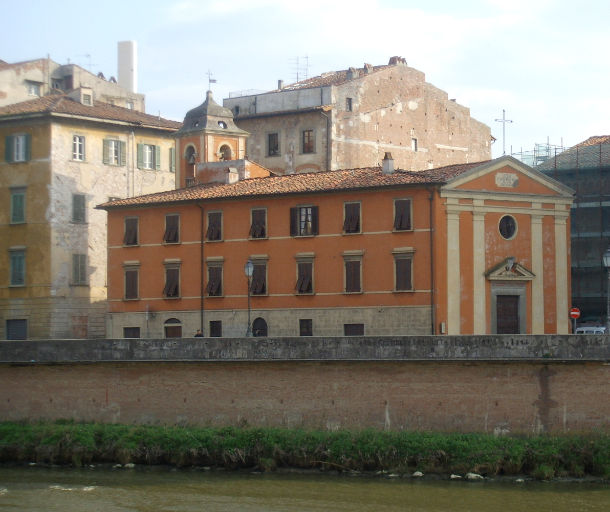 Chiesa_di_Santa_Cristina_(Pisa)